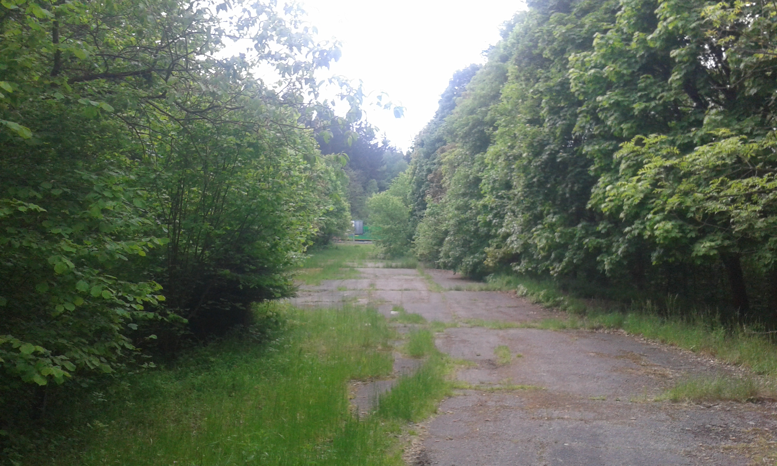 Čensko